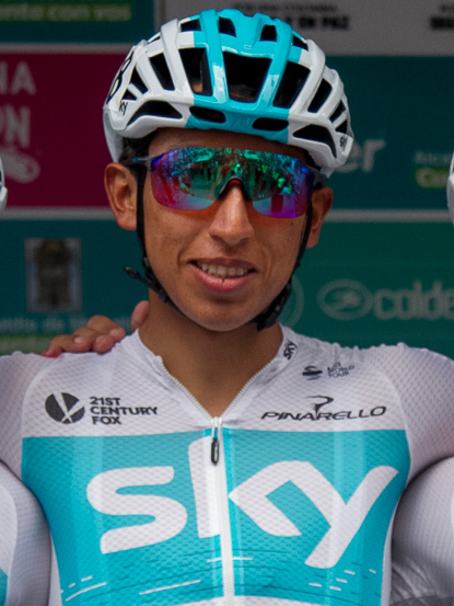 Egan Bernal en el campeonato nacional de ciclismo en ruta de Colombia 2018